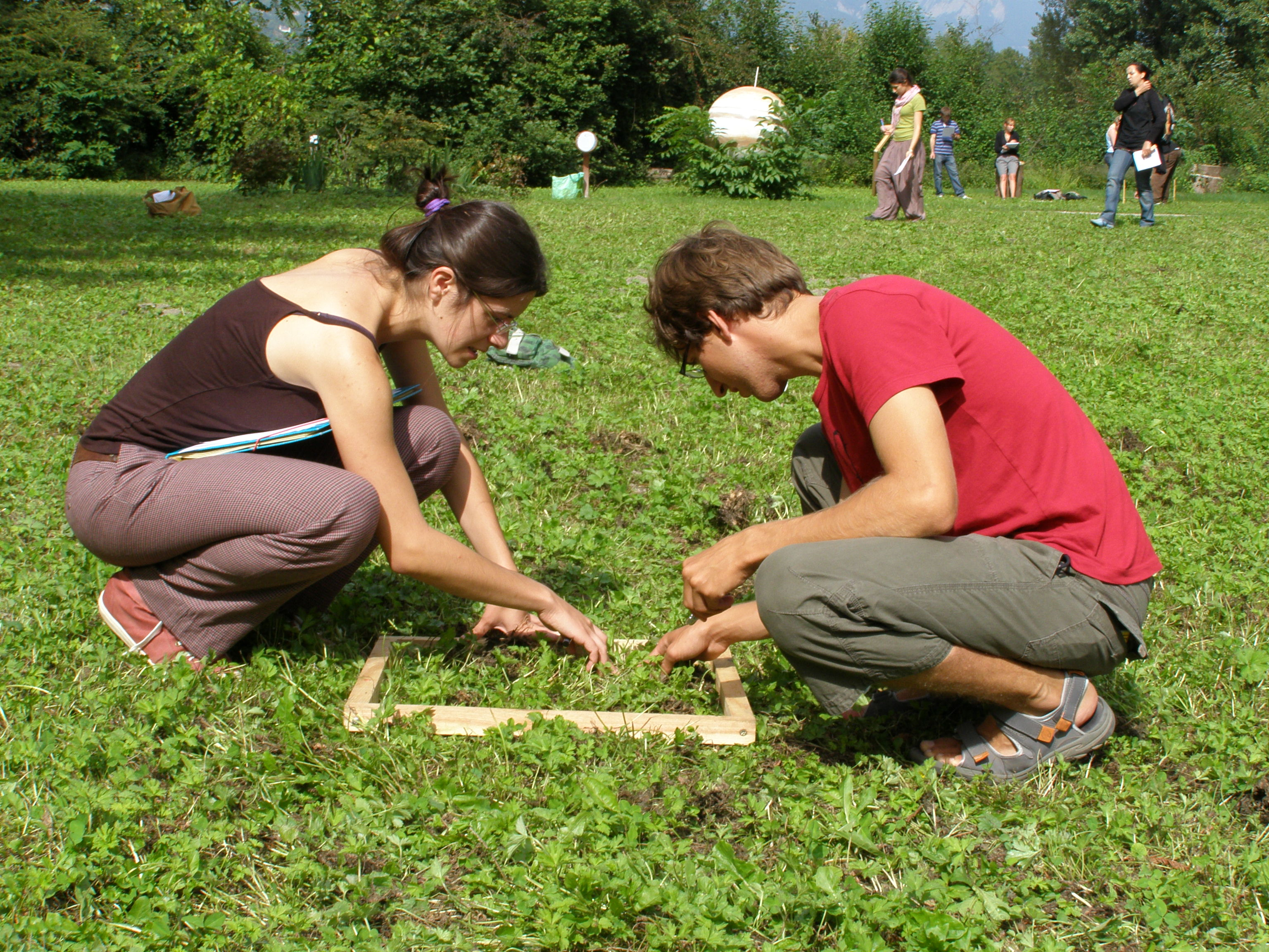 Taimkatte uuringud